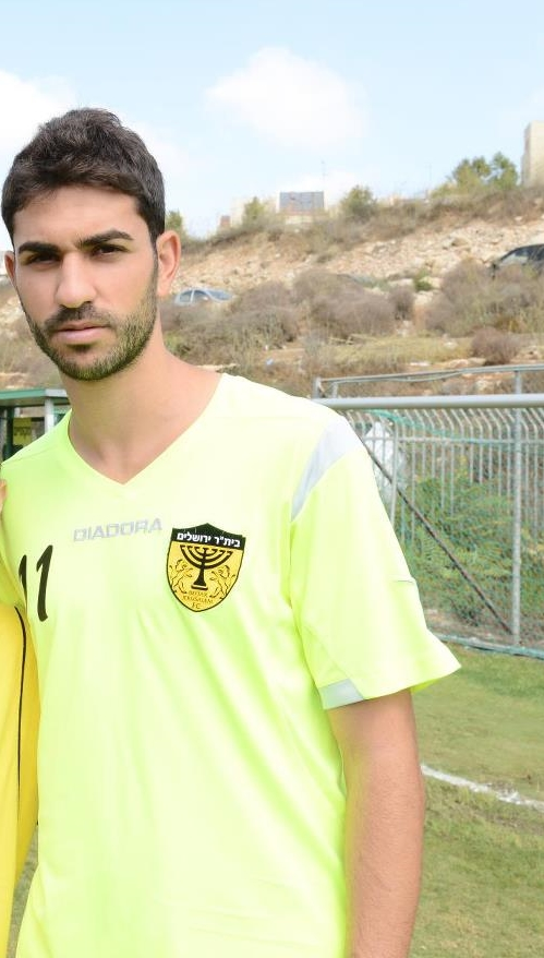 חן עזריאל במדי בית"ר ירושלים